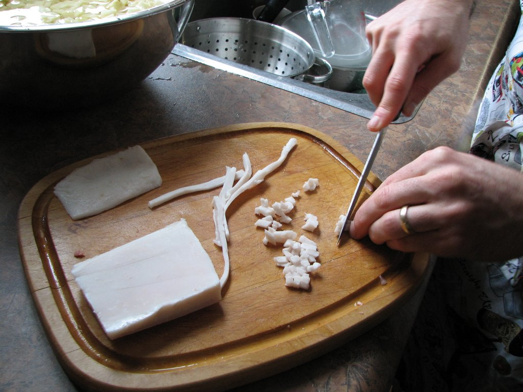 Lard pour la tourtière du Lac Saint-Jean